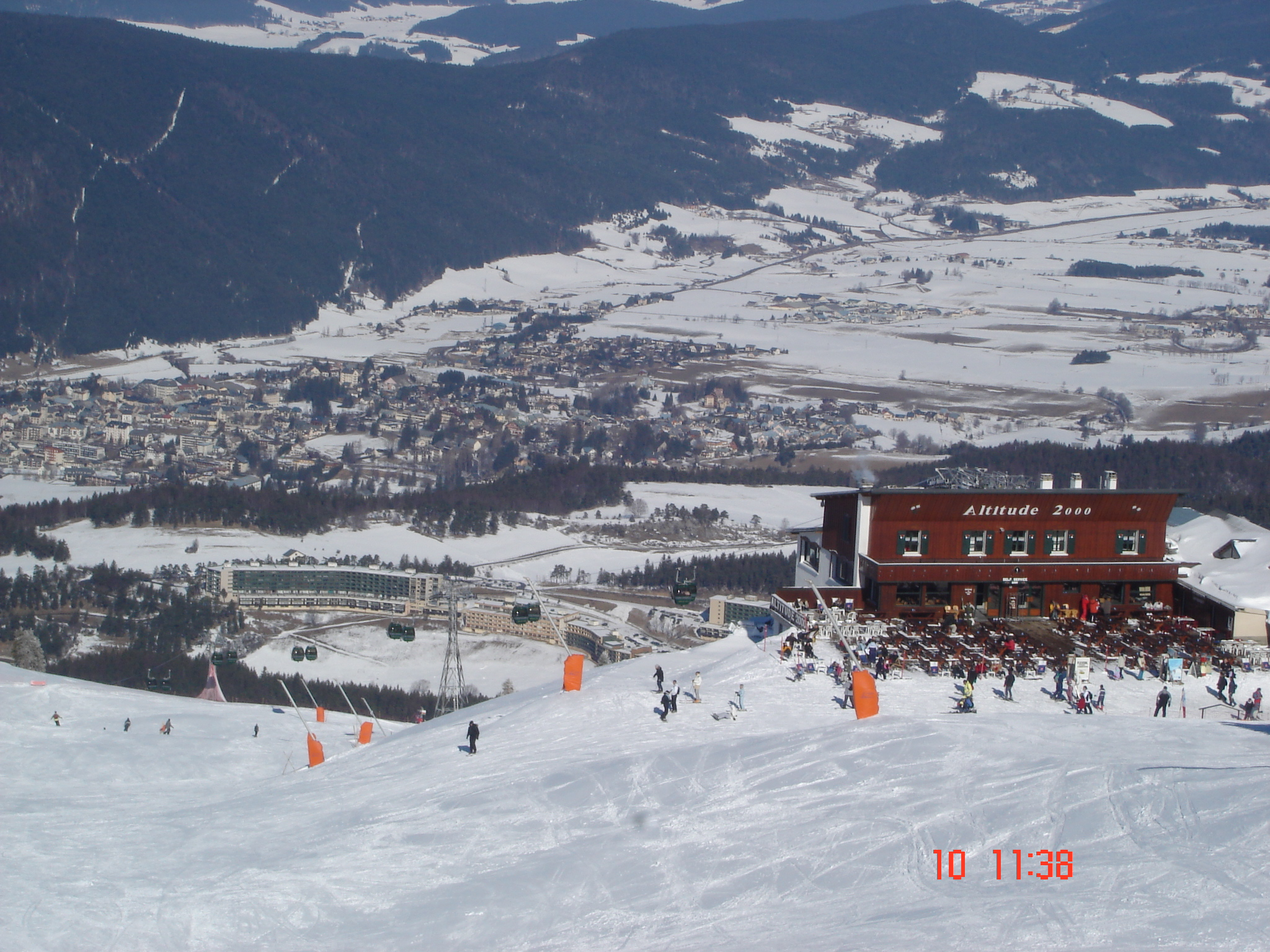 Espace Villard-Corrençon (38) : Restaurant d’altitude « Altitude 2000 ».